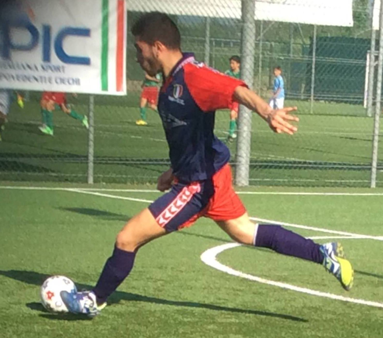 Scatto mentre il bomber tira un missile nello specchio